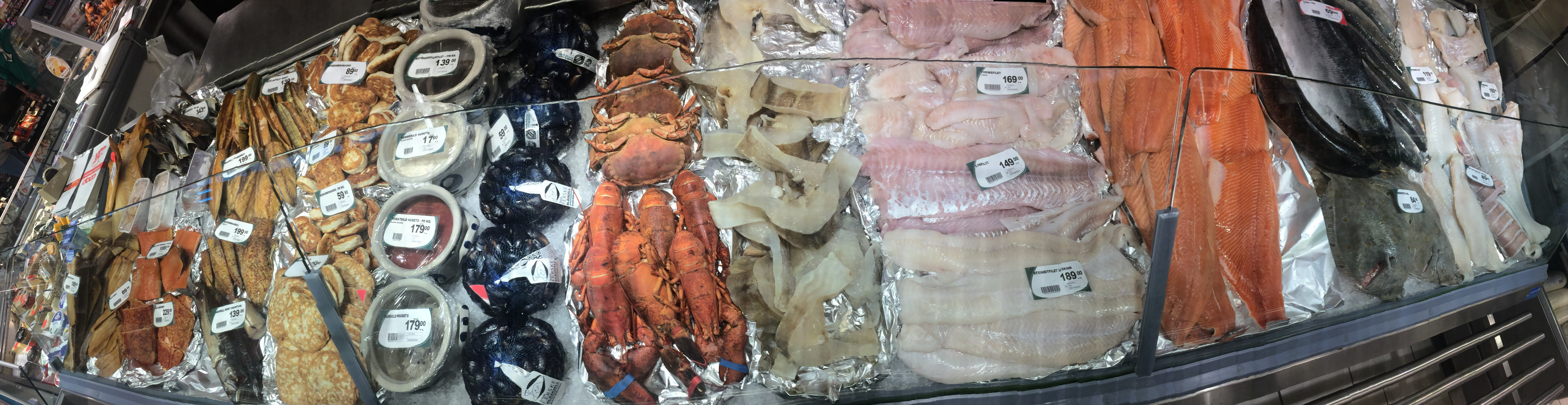 Sjømat til salgs i ferskvaredisken ved Coop i Førde, Sogn og Fjordane, september 2015. Fra venstre blant annet «sild røkt», peppermakrell», «makrell røkt», «makrell varmrøkt», «seikarbonader», «ishavsburger», «tomatsild», «sursild», blåskjell, krabbe, «torskefilet», «lyrfilet», «steinbitfilet uten skinn», «laks hel», «rødspette hel», Brosmefilet», «torskefilet», «uer lettsalta», Fortegnet (oppstykket) panoramabilde.